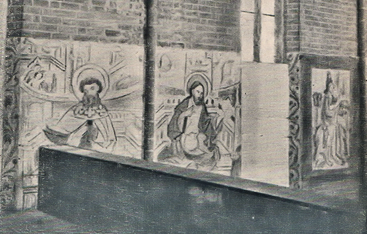 Polichromie w Chwarszczanach przed zamalowaniem